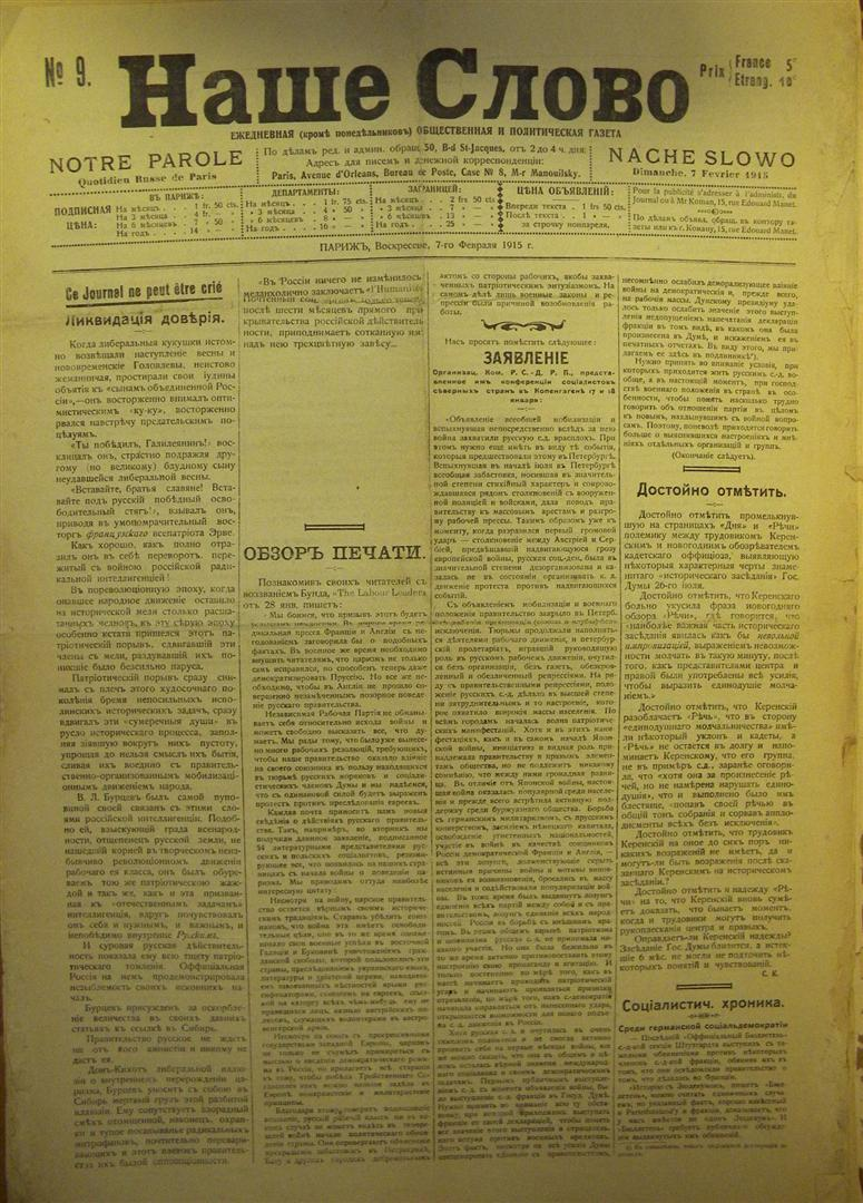 Наше слово (№9, 1915)